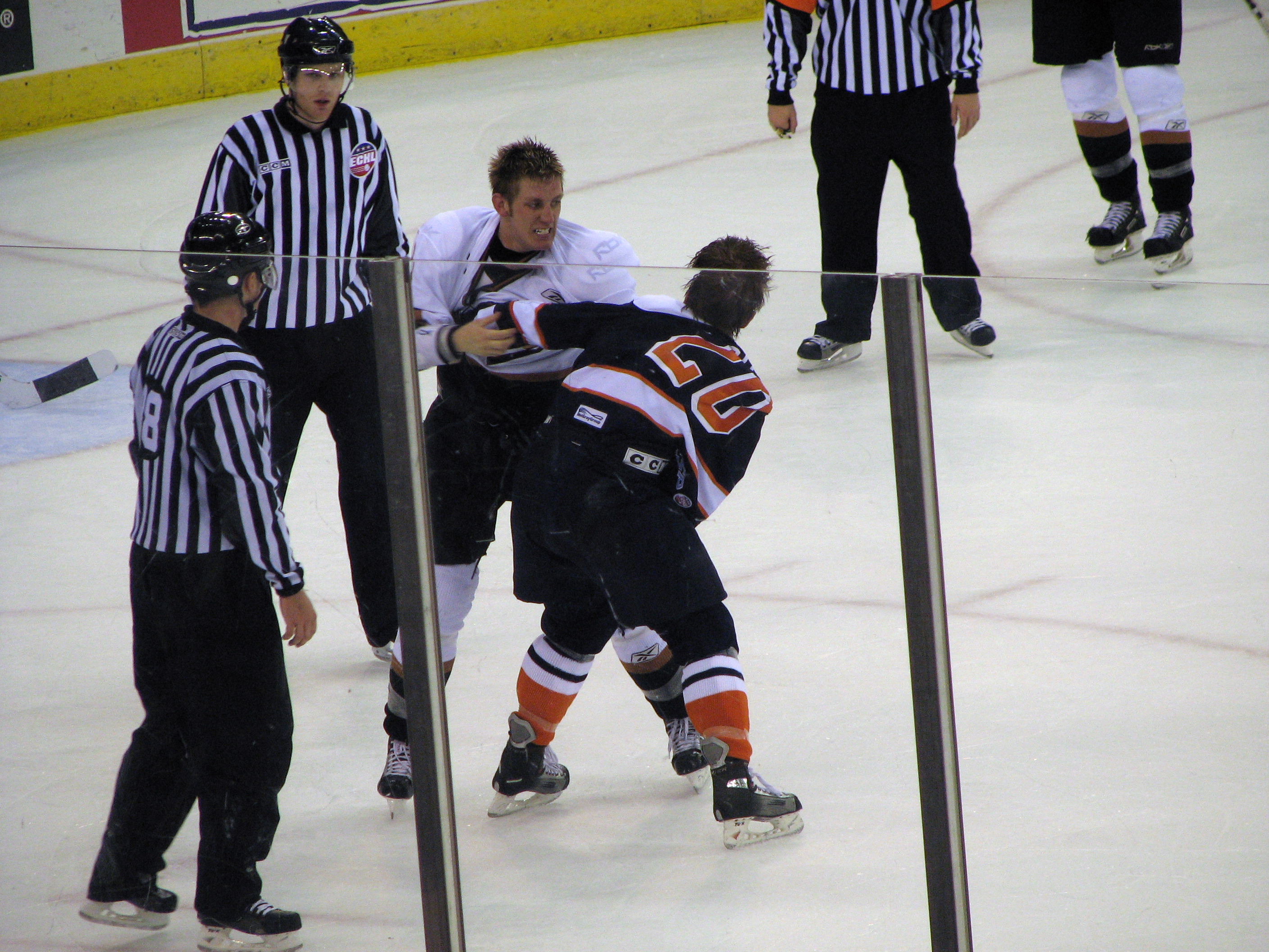 Utah Grizzlies @ Long Beach Ice Dogs, ECHL, 2007-01-27